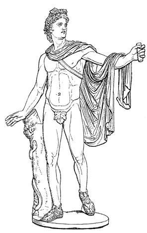 Apollon von Belvedere (Rom, Vatikan)